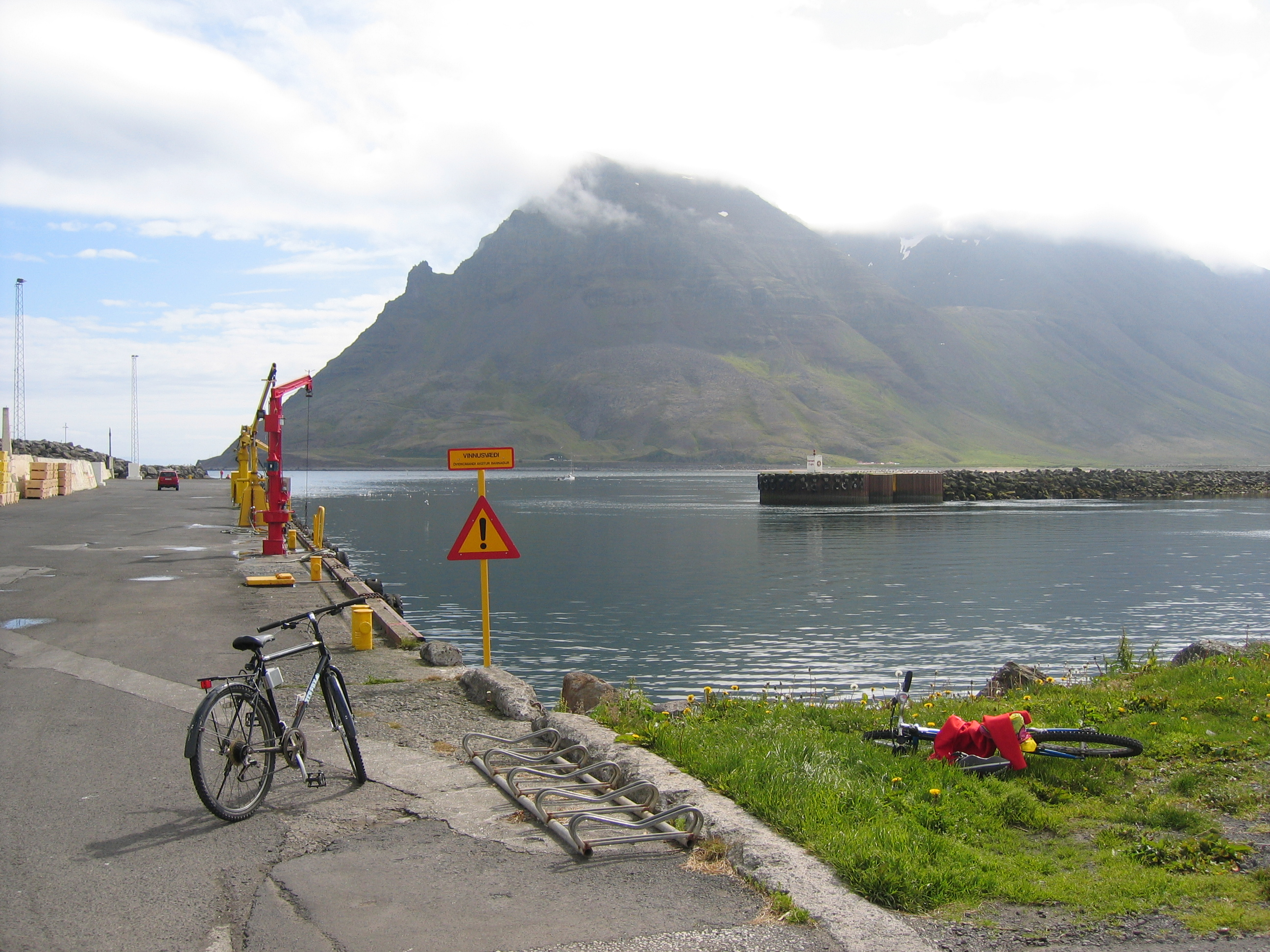 Bolungarvík, Iceland Salvör Gissurardóttir Julý 2006